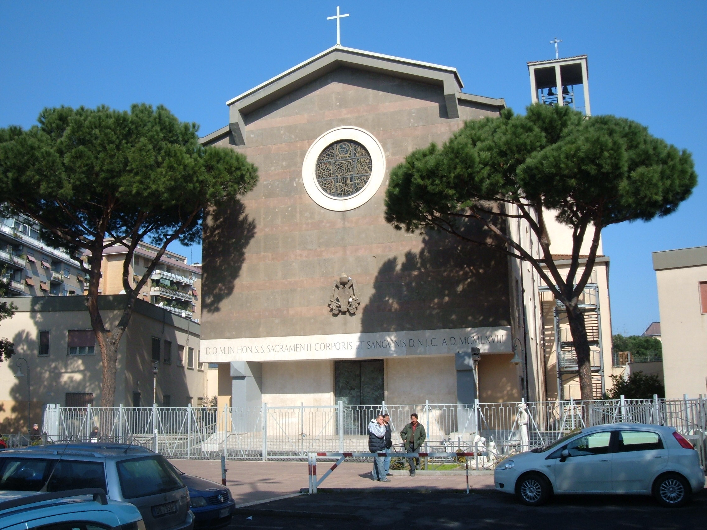 Chiesa del Santissimo Sacramento a Tor de' Schiavi, Roma, quartiere Prenestino-Labicano.